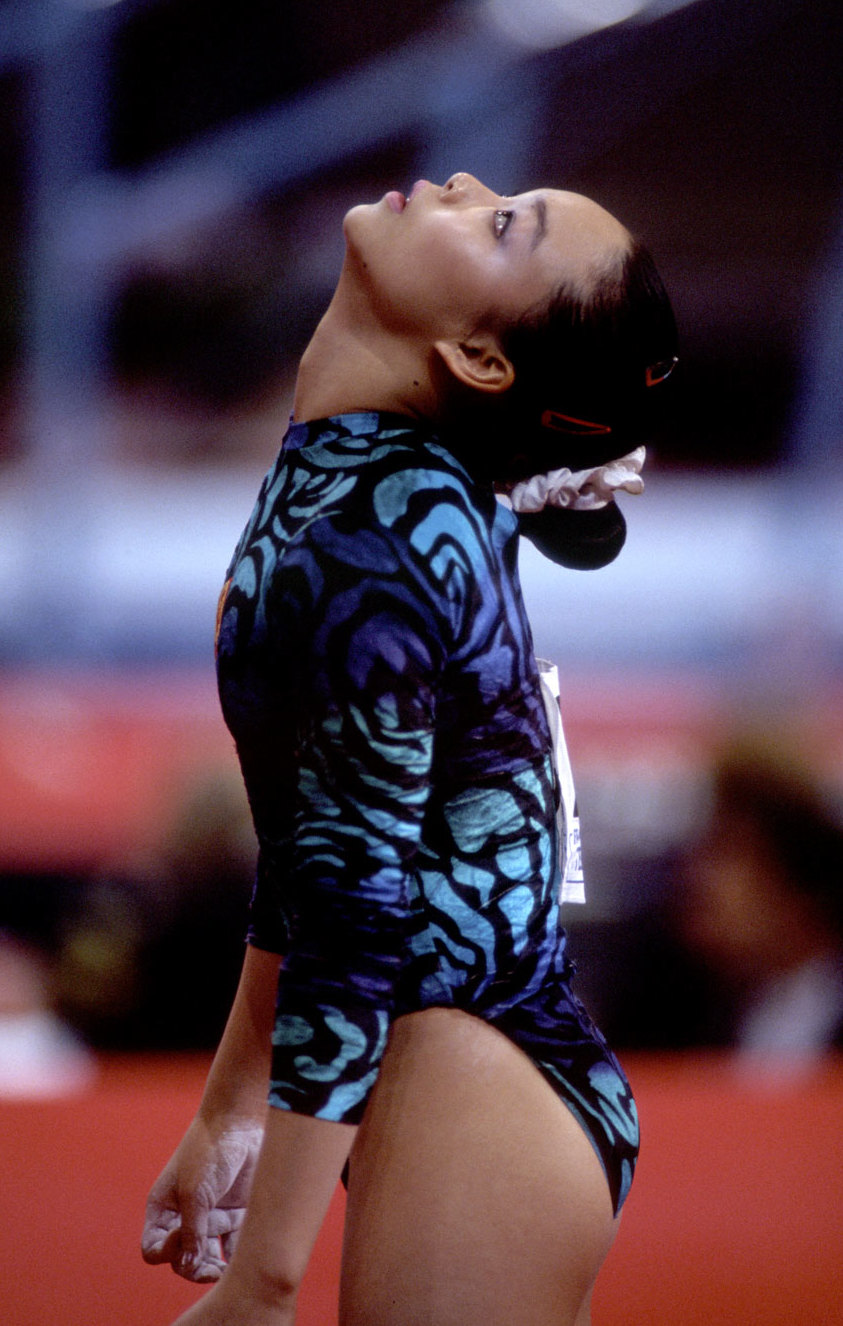 Yang BO. (CHN) Chpt Monde par spécialité Paris-Bercy 15-19/04/92